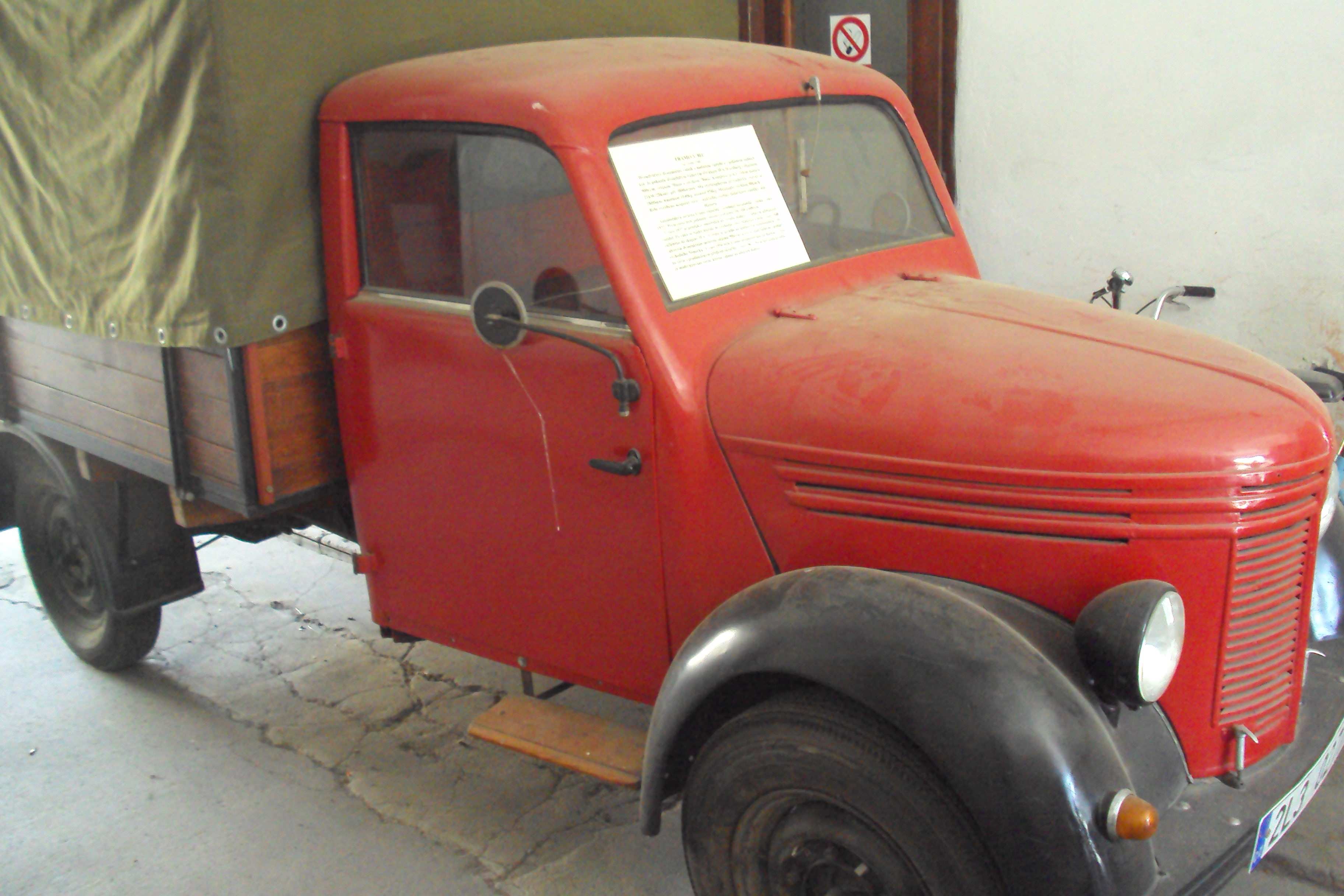 V průjezdu Eduard Held Muzea Zákupy je IFA Framo V 901